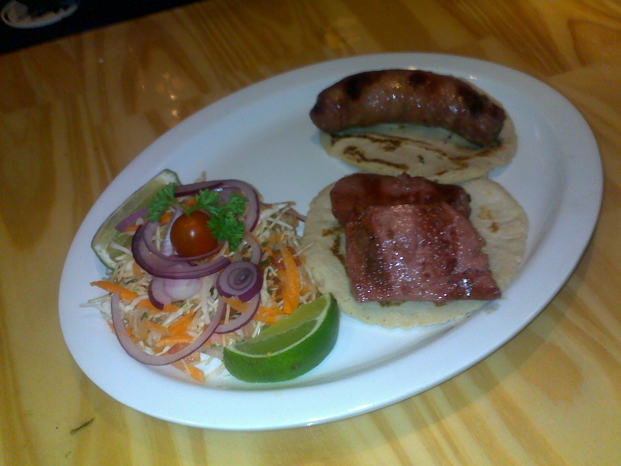 Gallos de Chorizo y Salchichón Típicos de Costa Rica